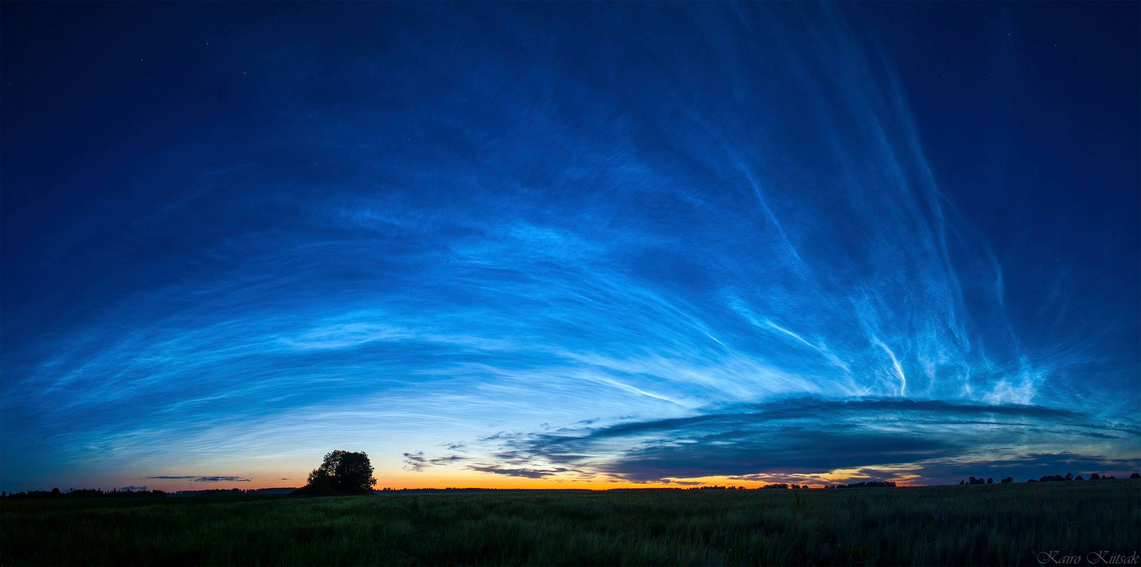 Lääne-Virumaa, Simuna 14.07.2016 Noctilucent clouds seen from Simuna, Estonia.